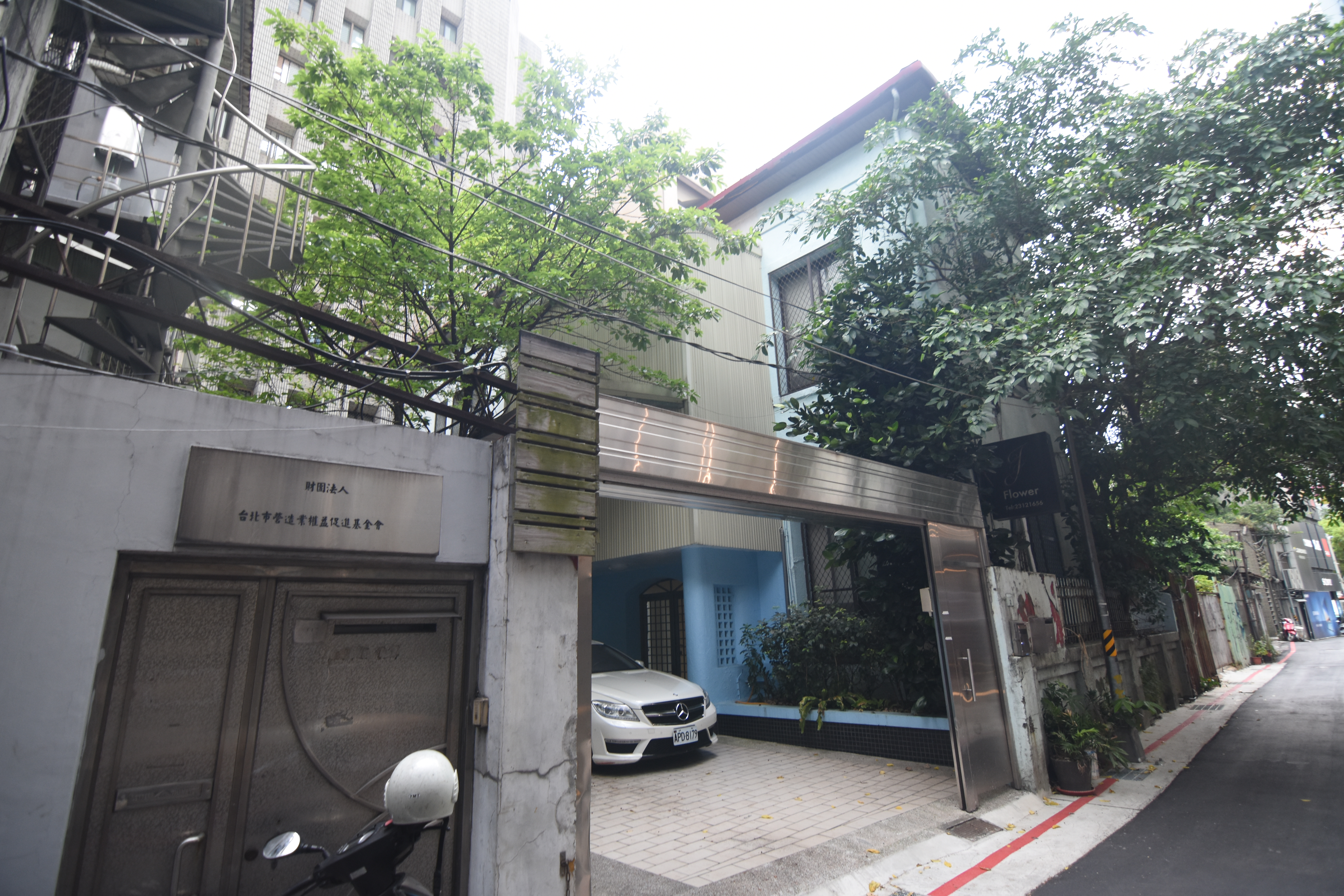 中文（台灣）: 原臺灣土木建築協會:本建物落成於日治時期，曾為日治時期「臺灣土木建築協會」使用，自1978年起由臺灣區綜合營造業同業公會取得產權並予使用，見證日治時期至今臺灣營造業發展歷史。 本建物曾於1945年因美軍空襲造成部分損毀，為臺北舊城區少數歷經二戰末期美軍轟炸後，留存至今之空間實體，見證臺北城市發展史價值。 建物入口門廳之樓梯間為大型挑空型態，1樓、2樓南向室內天花板挑高，立面以大面開窗採光，整體設計風格具聚會所之特色。 044562,121.5077533